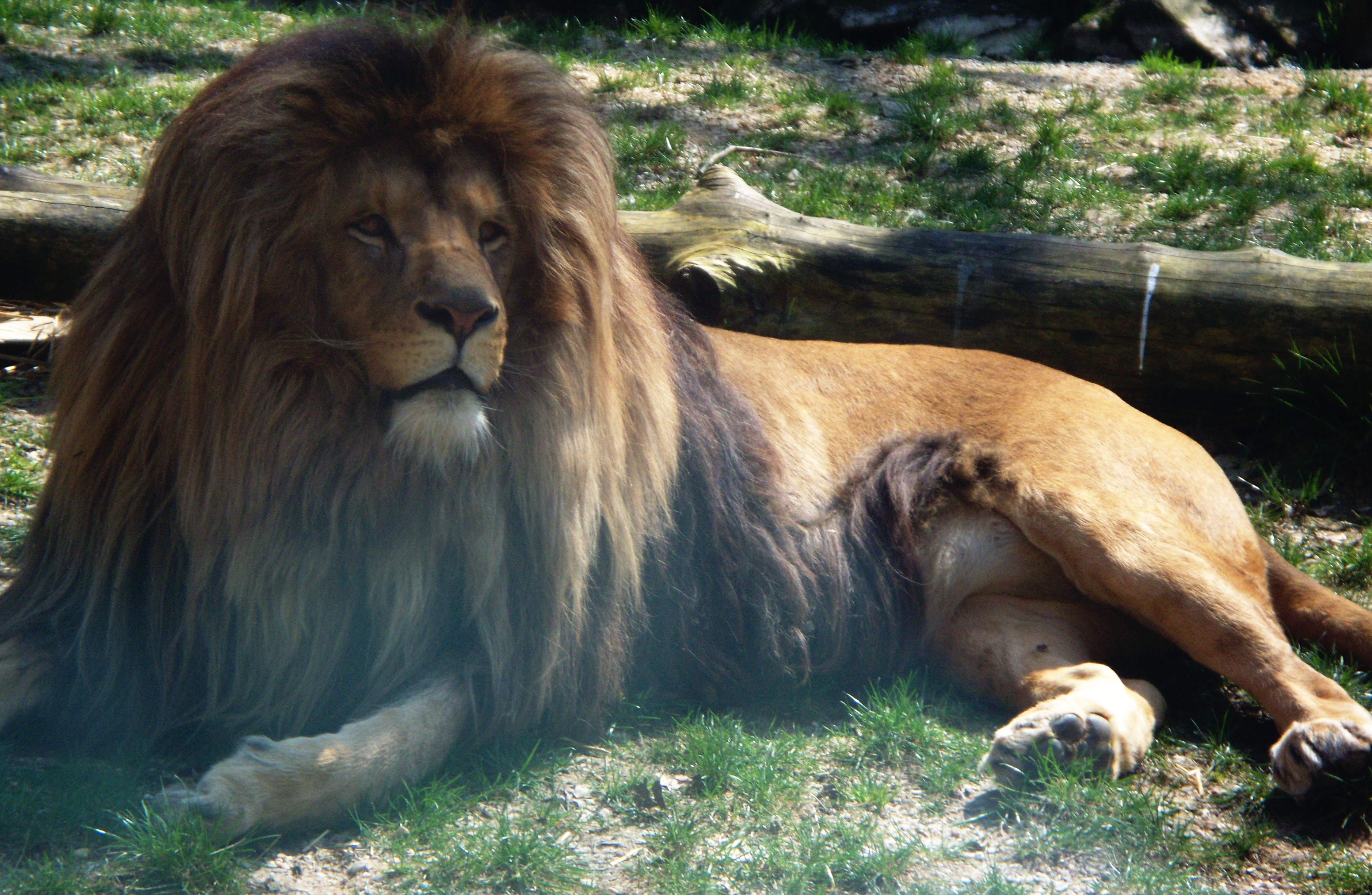 Angola-Löwe Malik im Tierpark Chemnitz